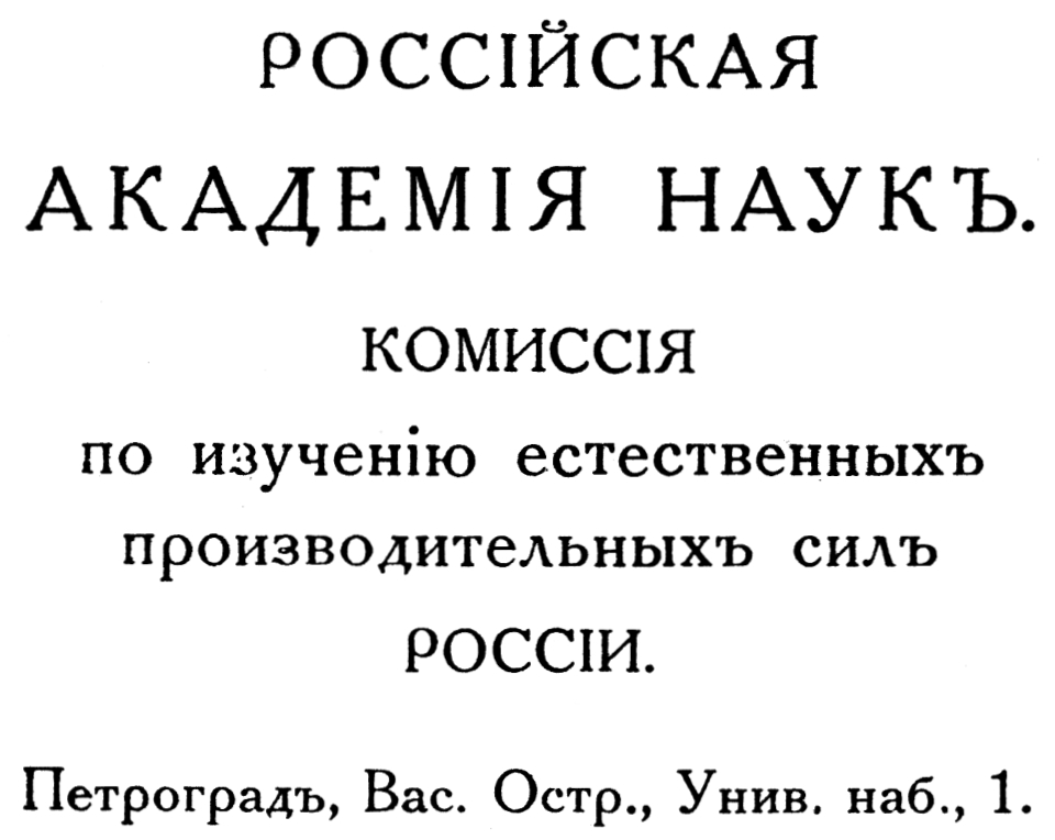 Бланк Комиссии по изучению естественных производительных сил России, Российской академии наук. Петроград, 1917 год.